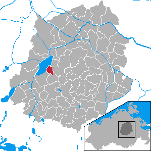 Sommersdorf, Landkreis Demmin, Mecklenburg-Vorpommern